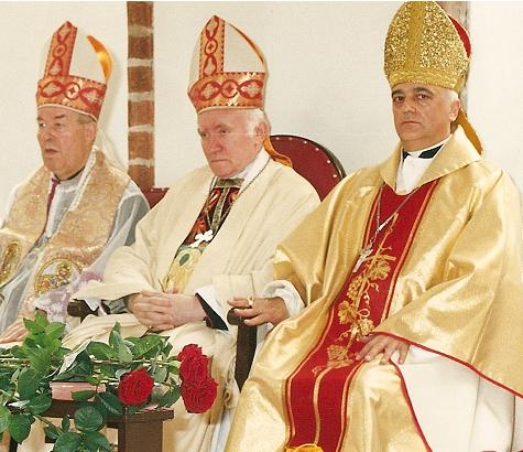 Bishop's of Polish Catholic Church: Zygmunt Koralewski † and Wieslaw Skolucki, priest Stanislaw Bosy Biskup Zygmunt Koralewski (zmarł), biskup senior Wiesław Skołucki i ks. infułat Stanisław Bosy